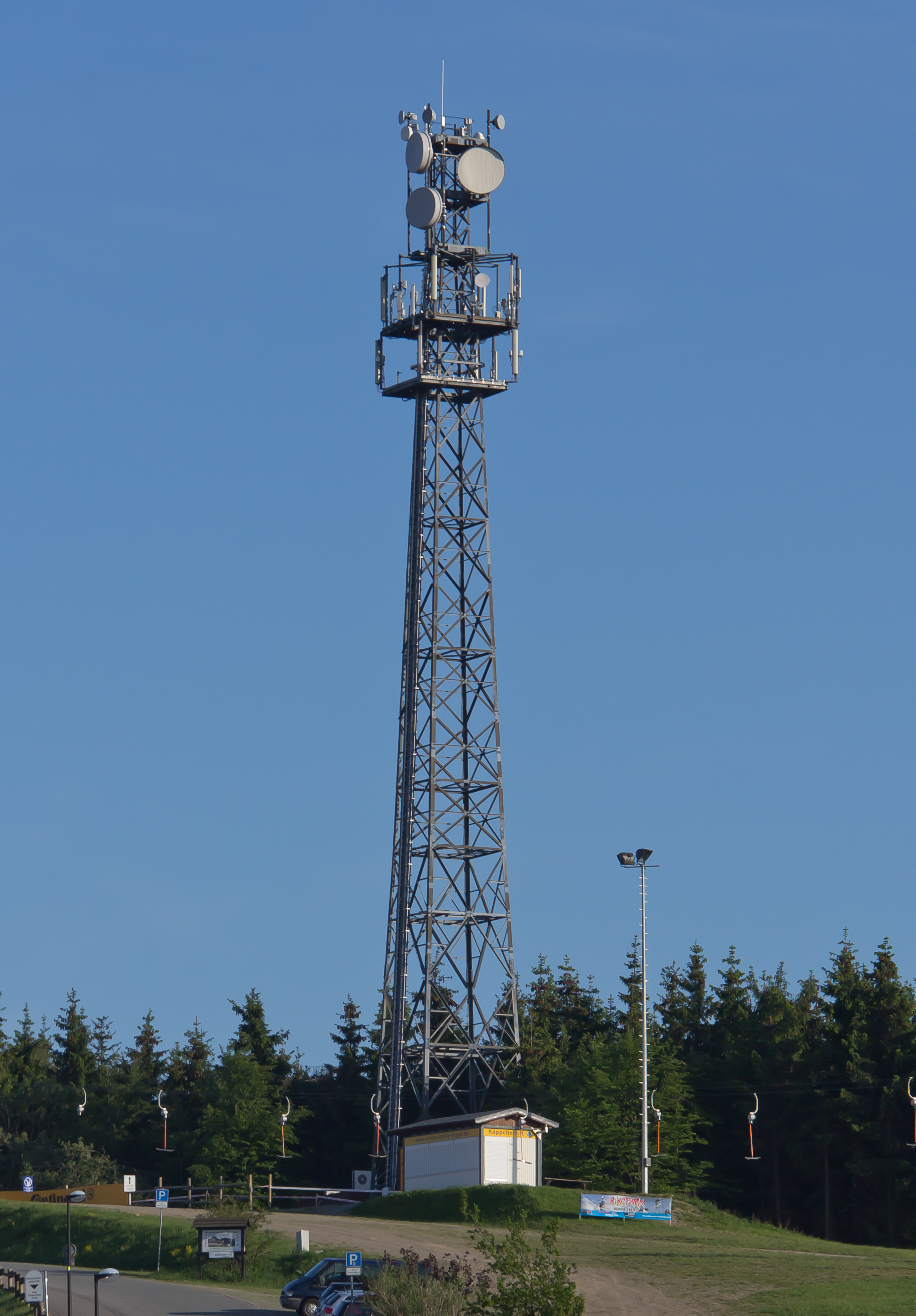 Funkturm auf dem Gipfel des Kappe bei Winterberg